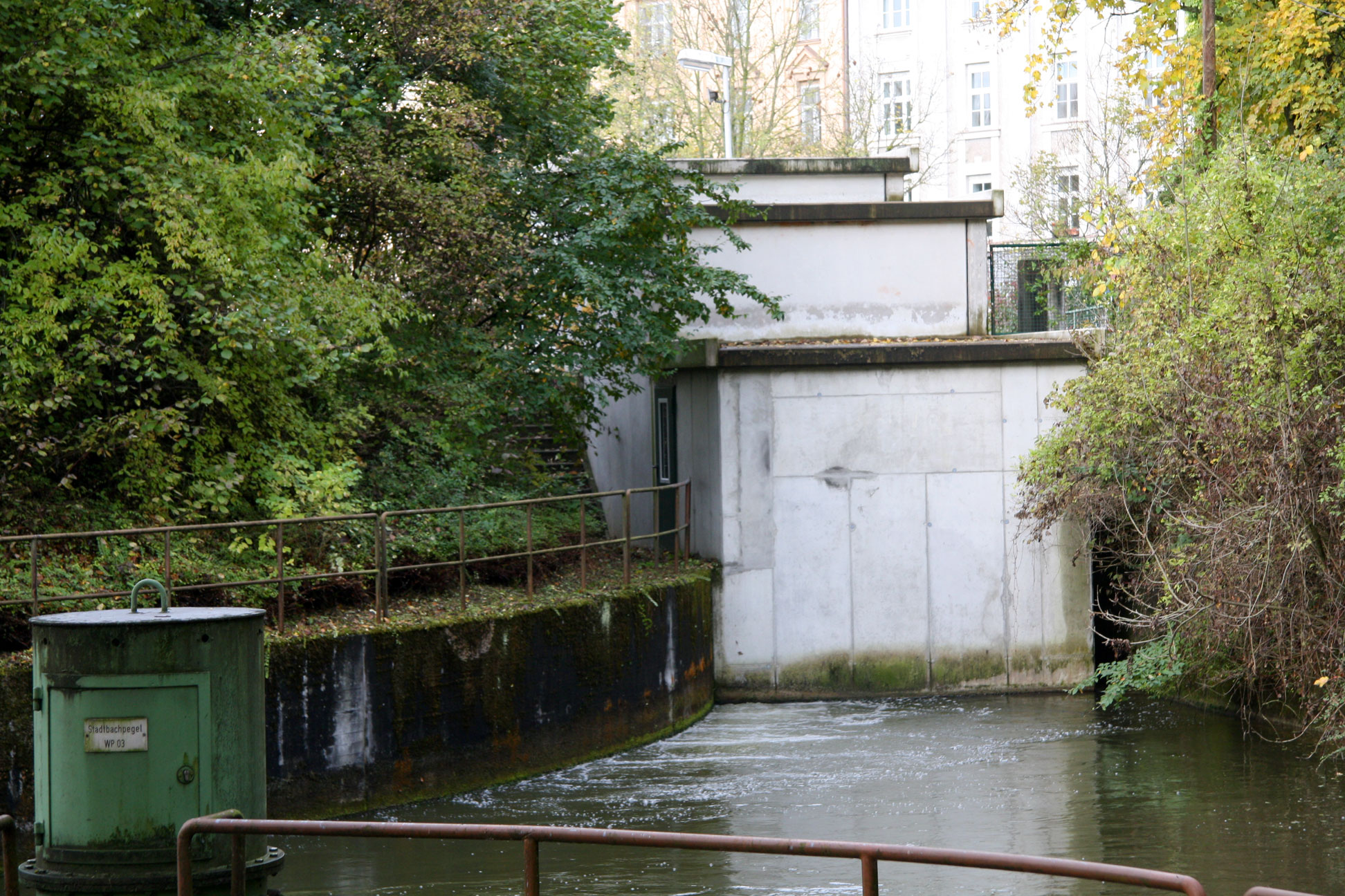 Ablauf des Großen Stadtbachs aus der Stadtbachstufe in München